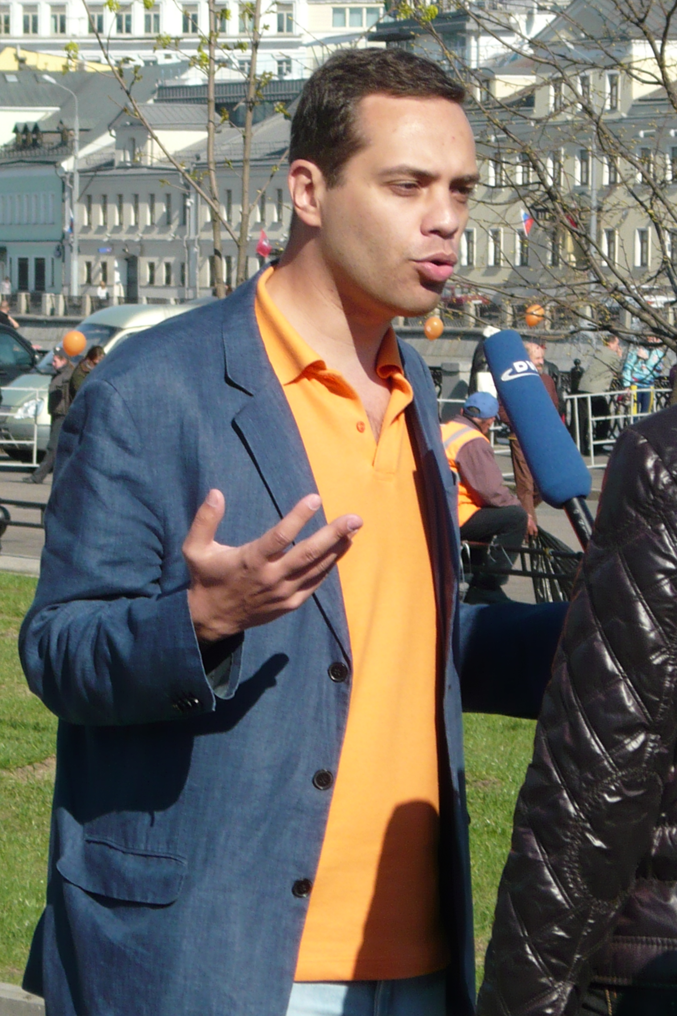 Владимир Милов во время проведения первого первомайского митинга движения Солидарность. 1 мая 2009